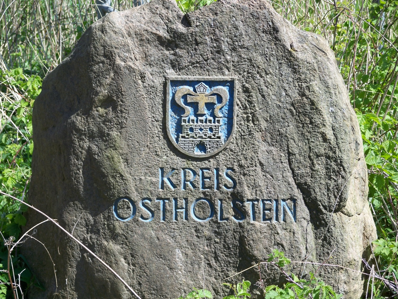 Grenzstein an der Grenze der Kreise Ostholstein und Segeberg